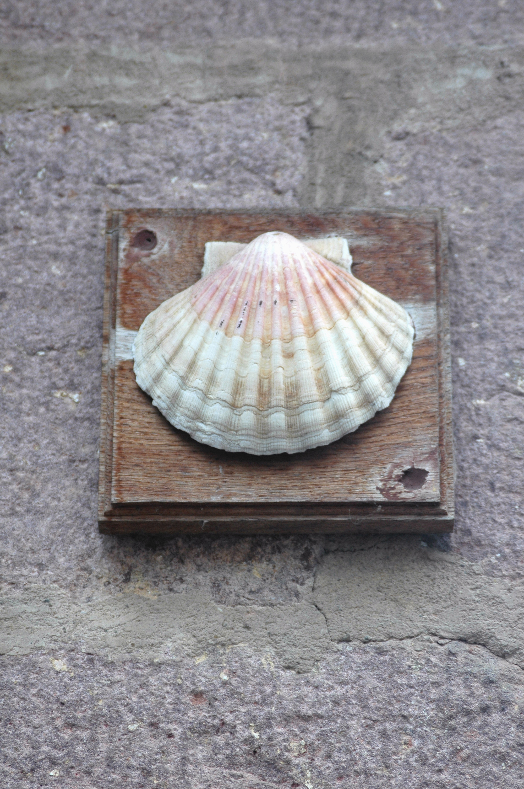 Saint-Jean-Pied-de-Port, sur le chemin de Saint-Jacques de Compostelle. Photo prise le 13/07/06 par Harrieta171